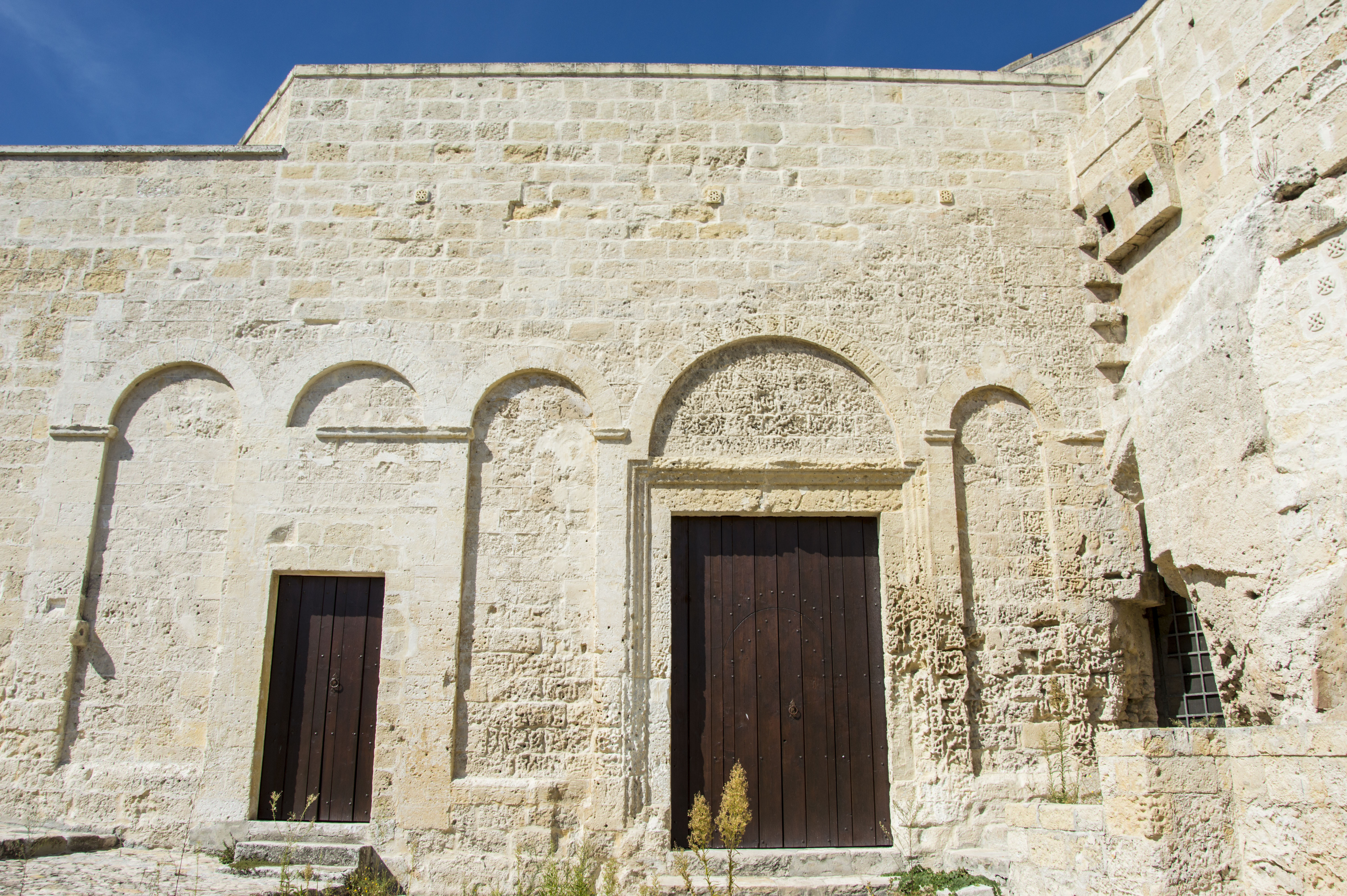 chiesa di Santa Maria de Armenis This is a photo of a monument which is part of cultural heritage of Italy.